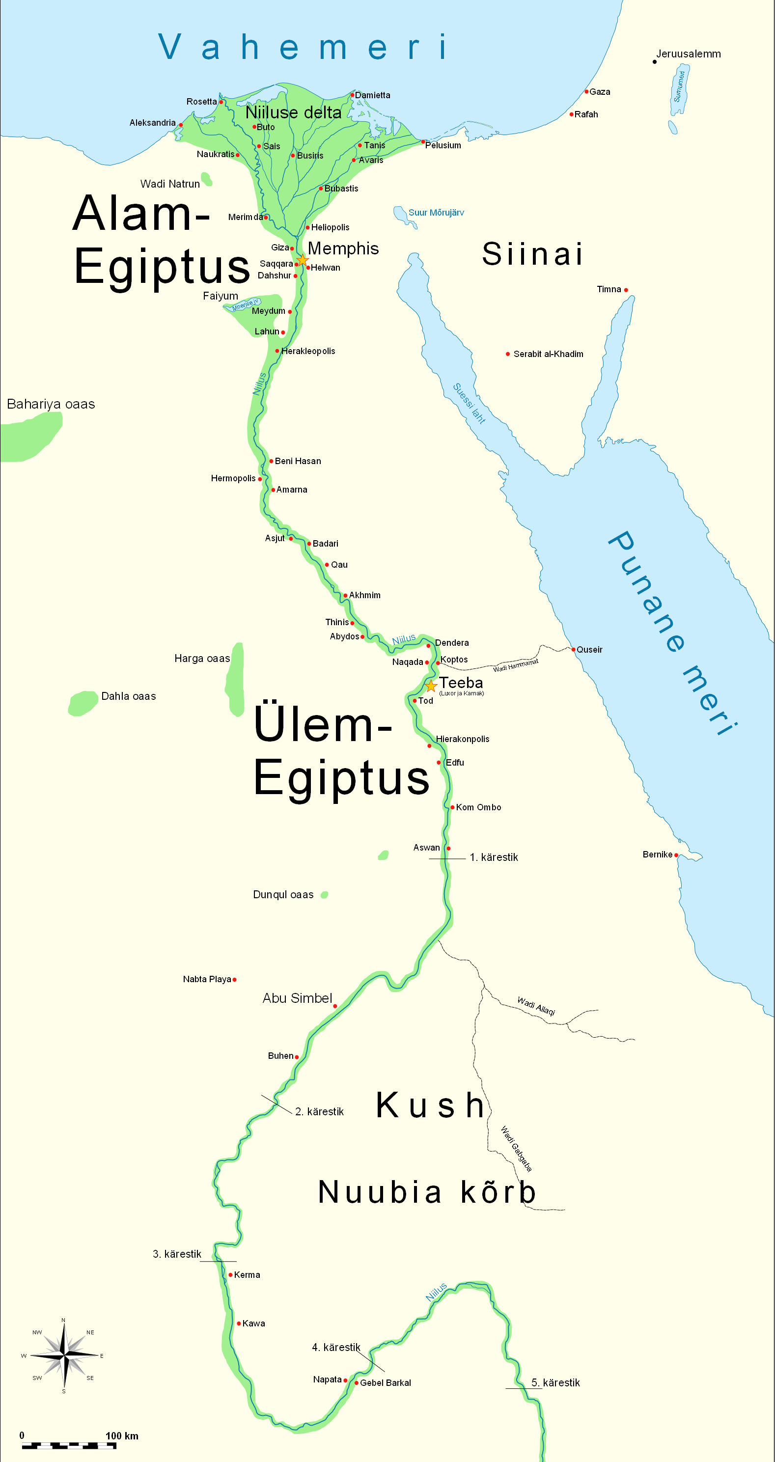 Muistne Egiptus. Märkus: kohanimed on vaja üle kontrollida!